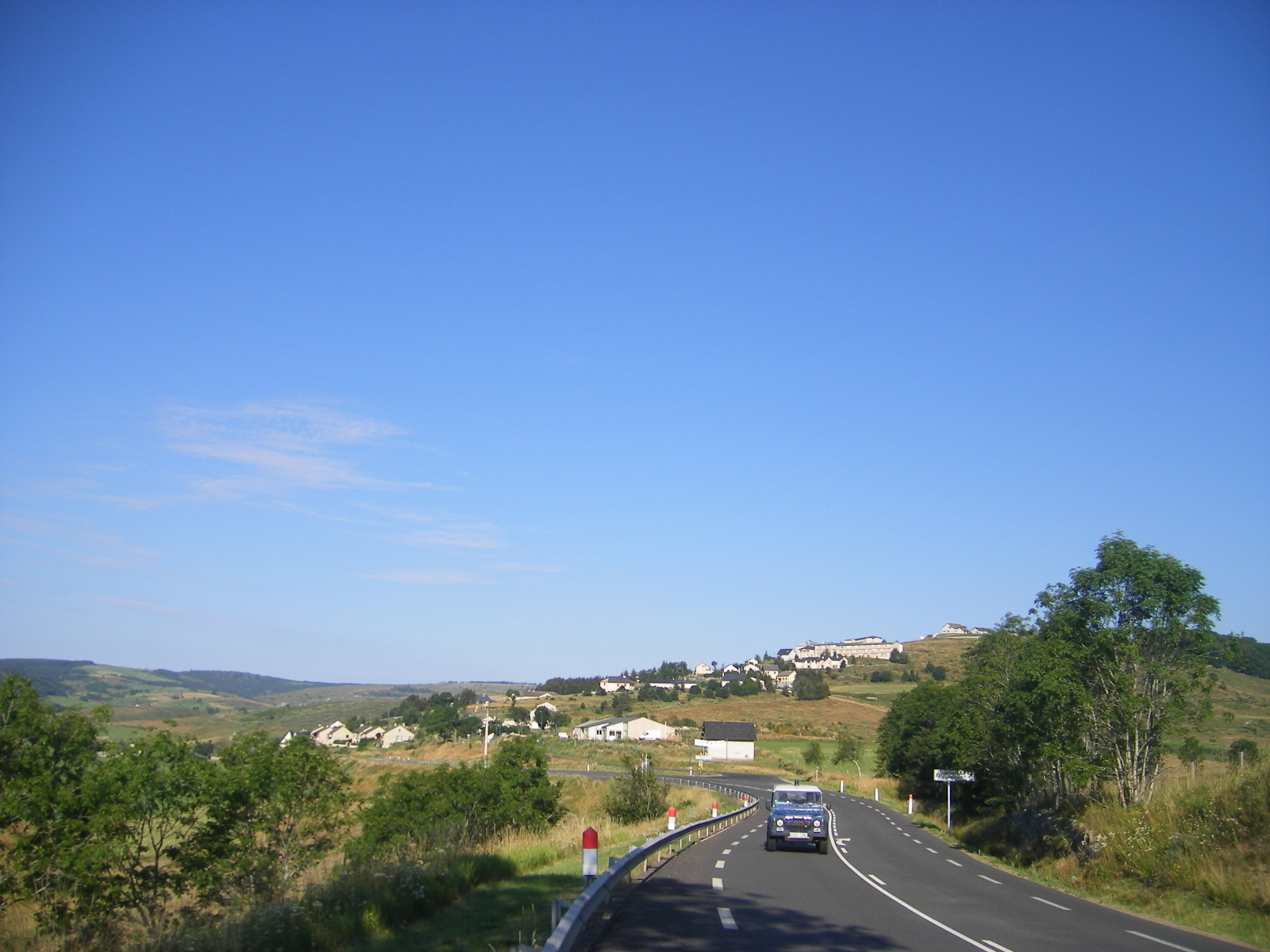 Châteauneuf-de-Randon - from route N88